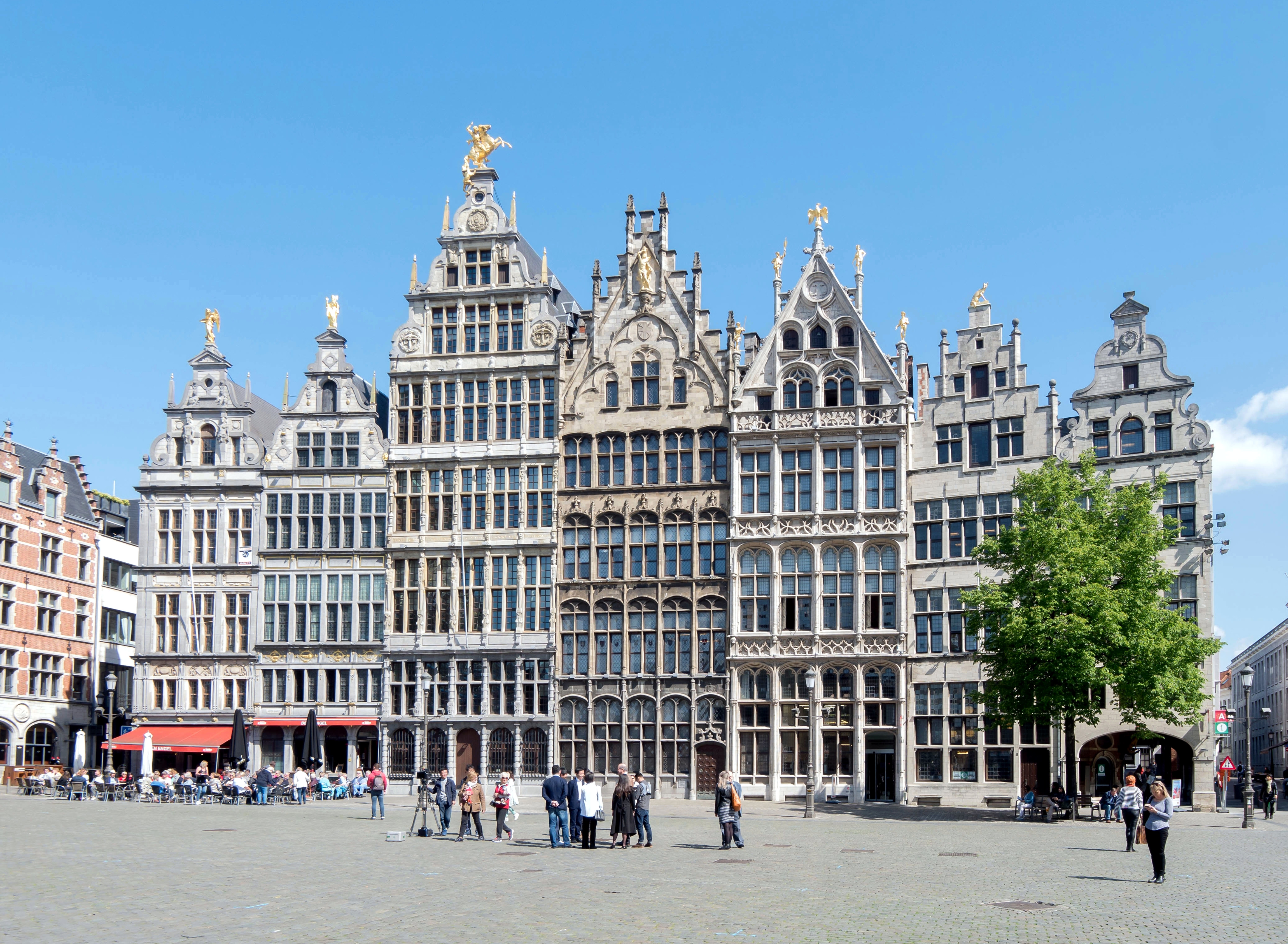 Renaissancebauten in Flandern, 16. Jahrhundert (erneuert nach 1945)